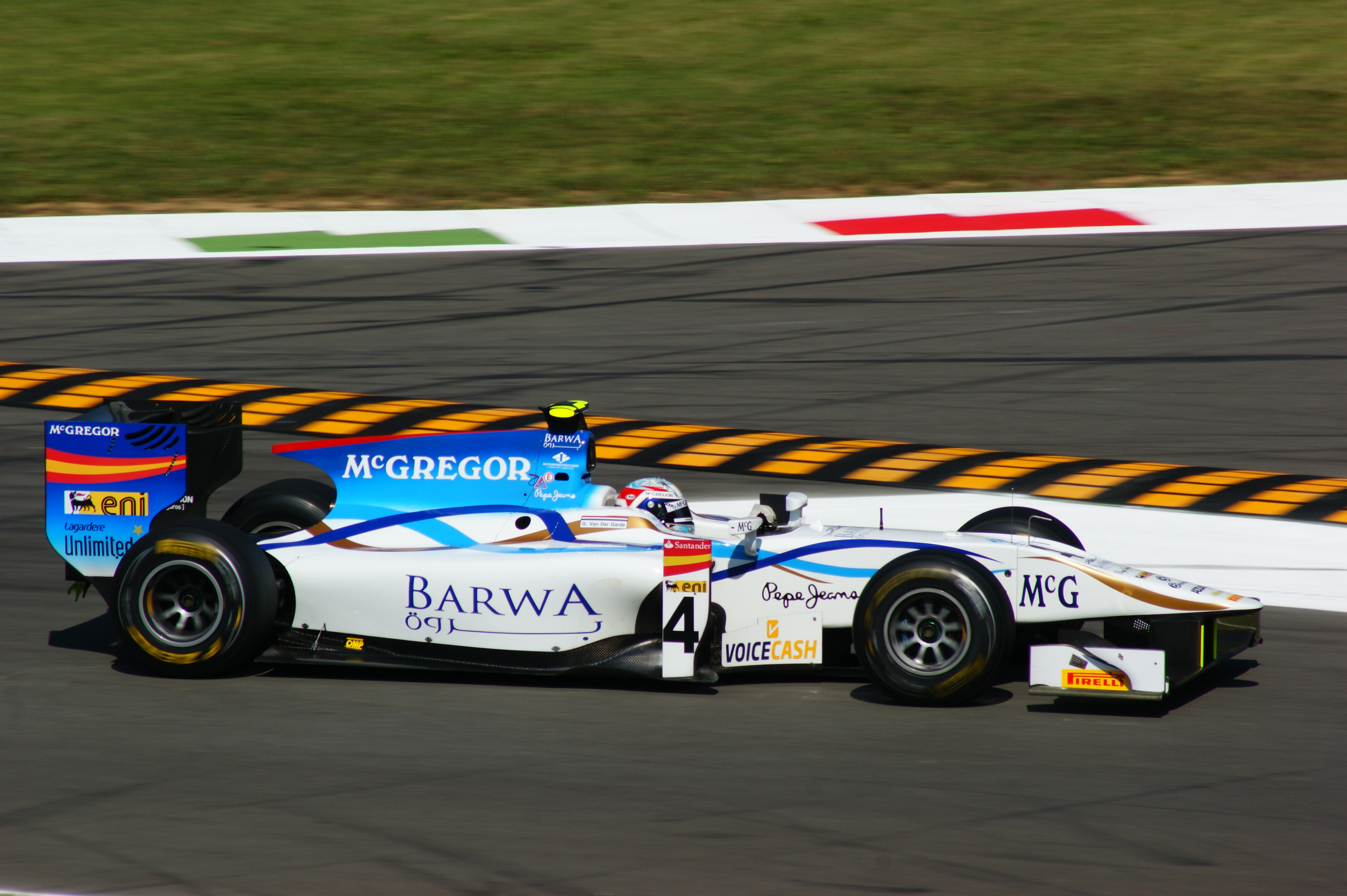 Giedo van der Garde alla prima variante Monza 2011